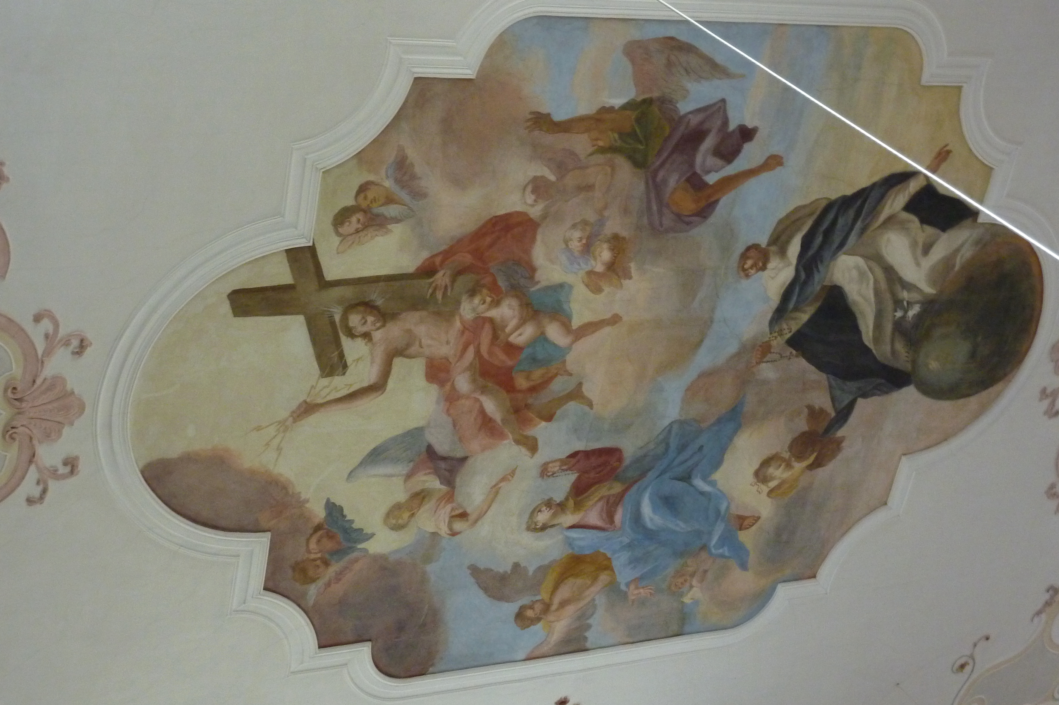 Katholische Pfarrkirche St. Georg in Aislingen im Landkreis Dillingen an der Donau (Bayern), Deckenbilder von Matthias Wolcker (1737), Darstellung: hl. Dominikus mit Lilie und Rosenkranz auf einer Weltkugel vor Christus